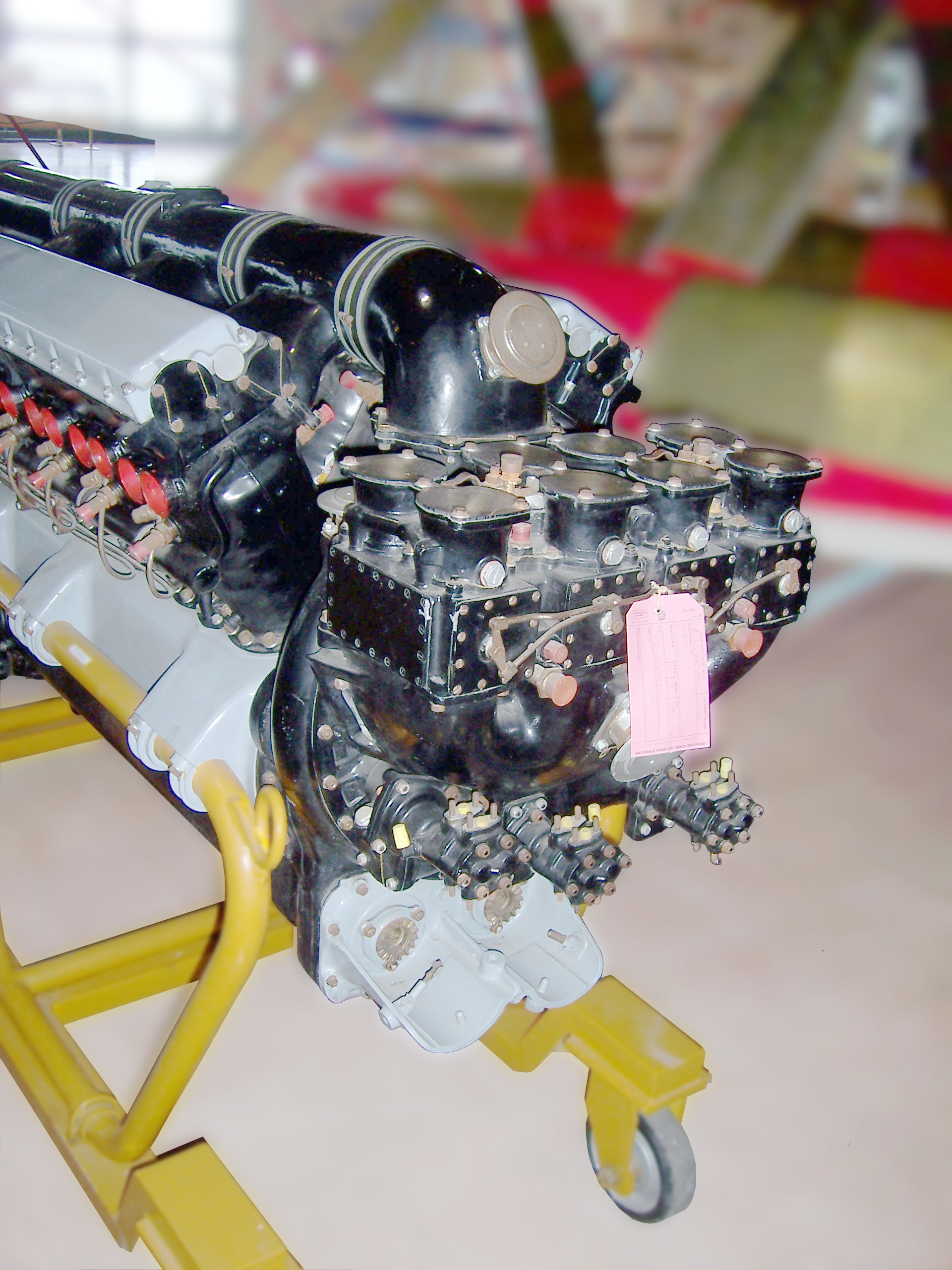 Triebwerk Fiat AS.6 der Macchi-Castoldi M.C.72: Detail Vergaser